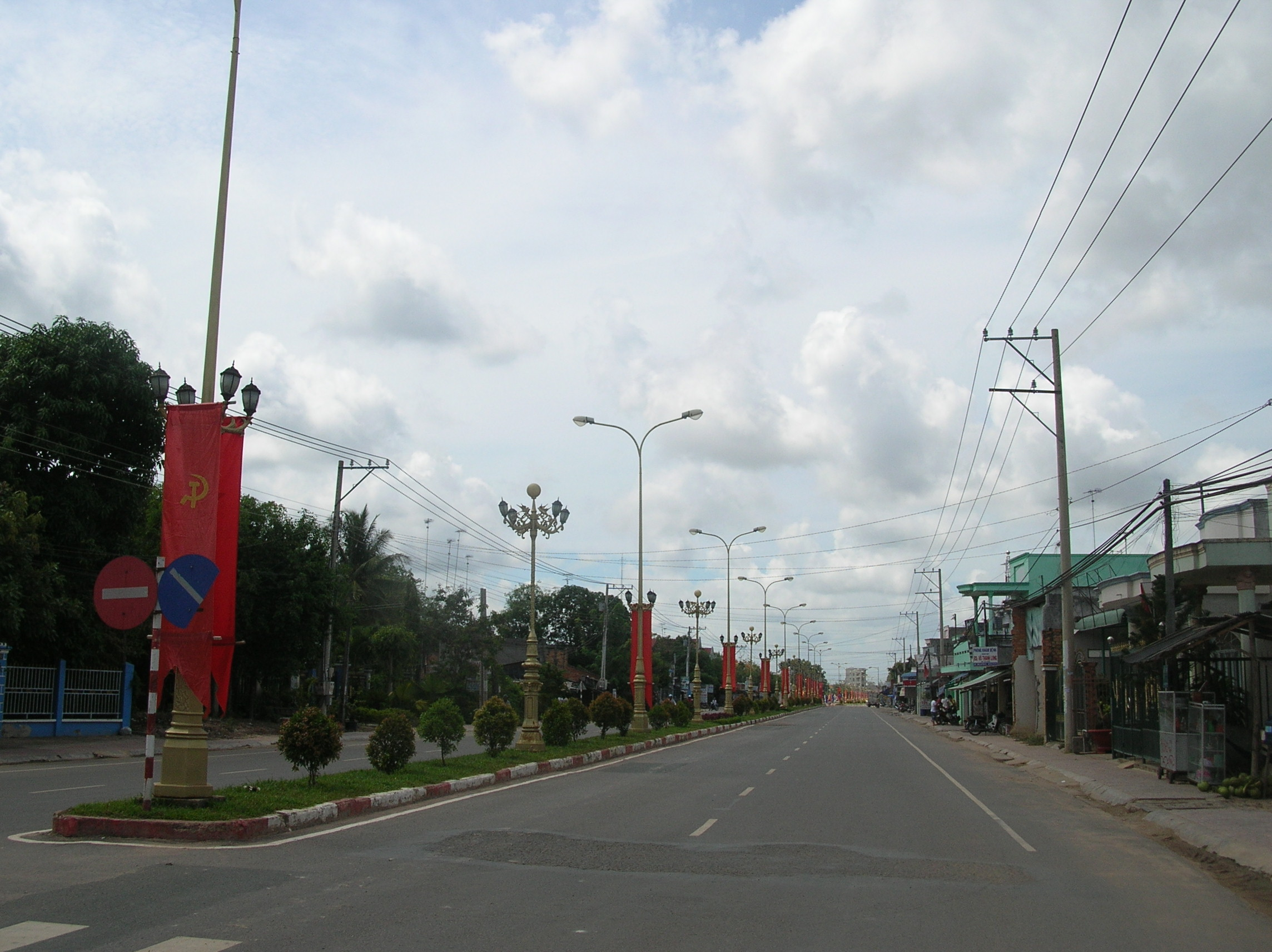 Thị trấn Bến Cầu, Tây Ninh